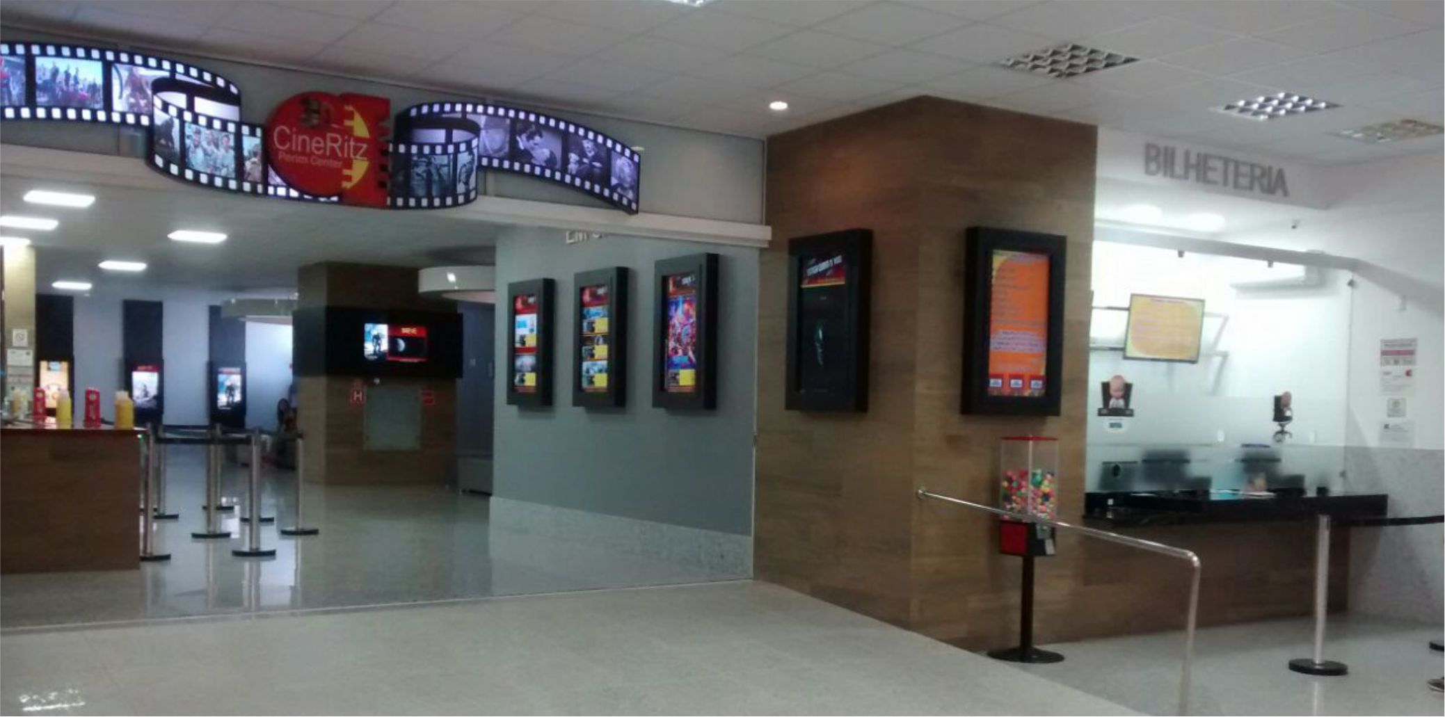 Entrada do Cine Ritz Perim Center